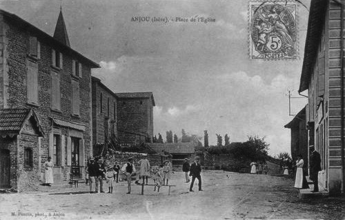 Place de l'église. Anjou, Isère, France. Carte postale ancienne.